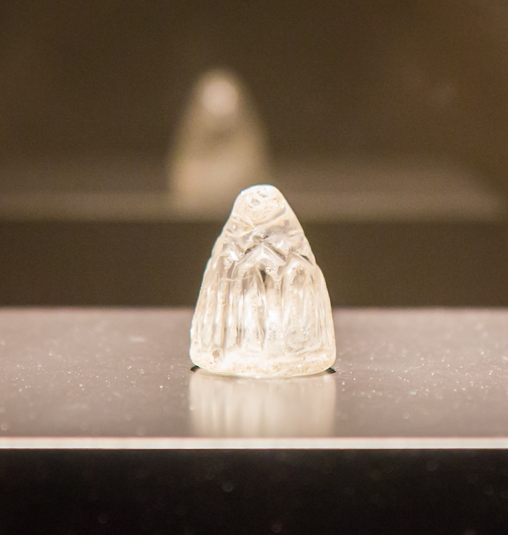 Schachfigur aus Bergkristall, möglicherweise von Karl dem Großen. Museum Schnütgen, Ausstellung „Expedition Mittelalter“, Inv. F 52